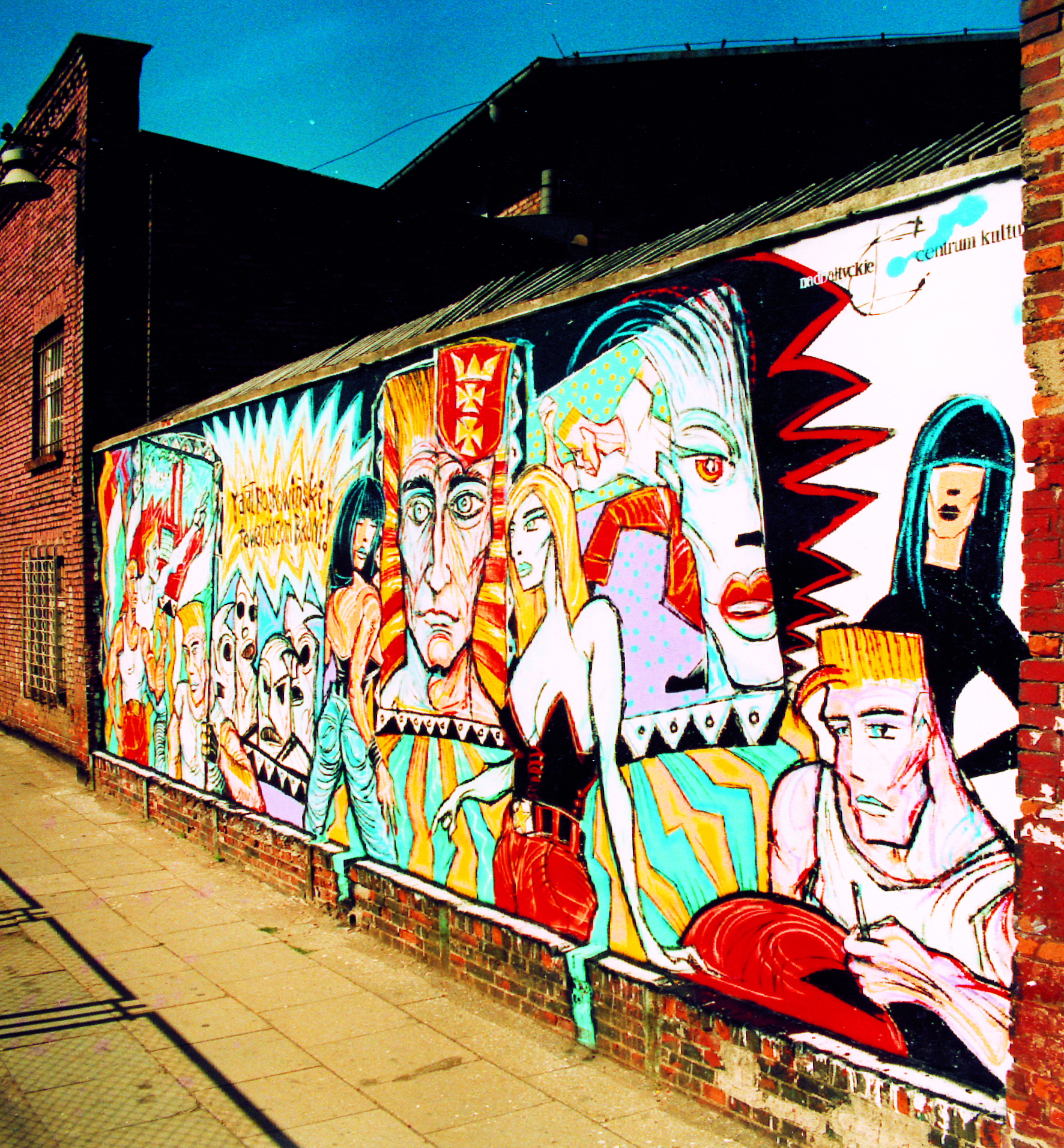 Rafał Roskowiński - materiały ze zbiorów autora.